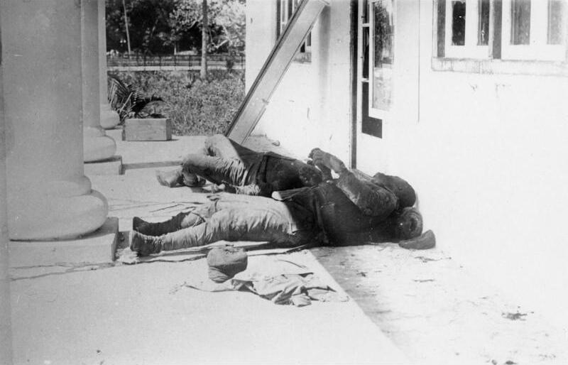 Deutsch-Ost-Afrika Kriegsopfer